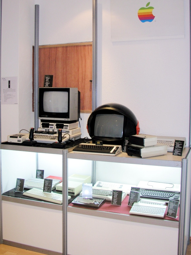 PEEK&POKE "muzej" starih računala i informatičke tehnologije u Rijeci